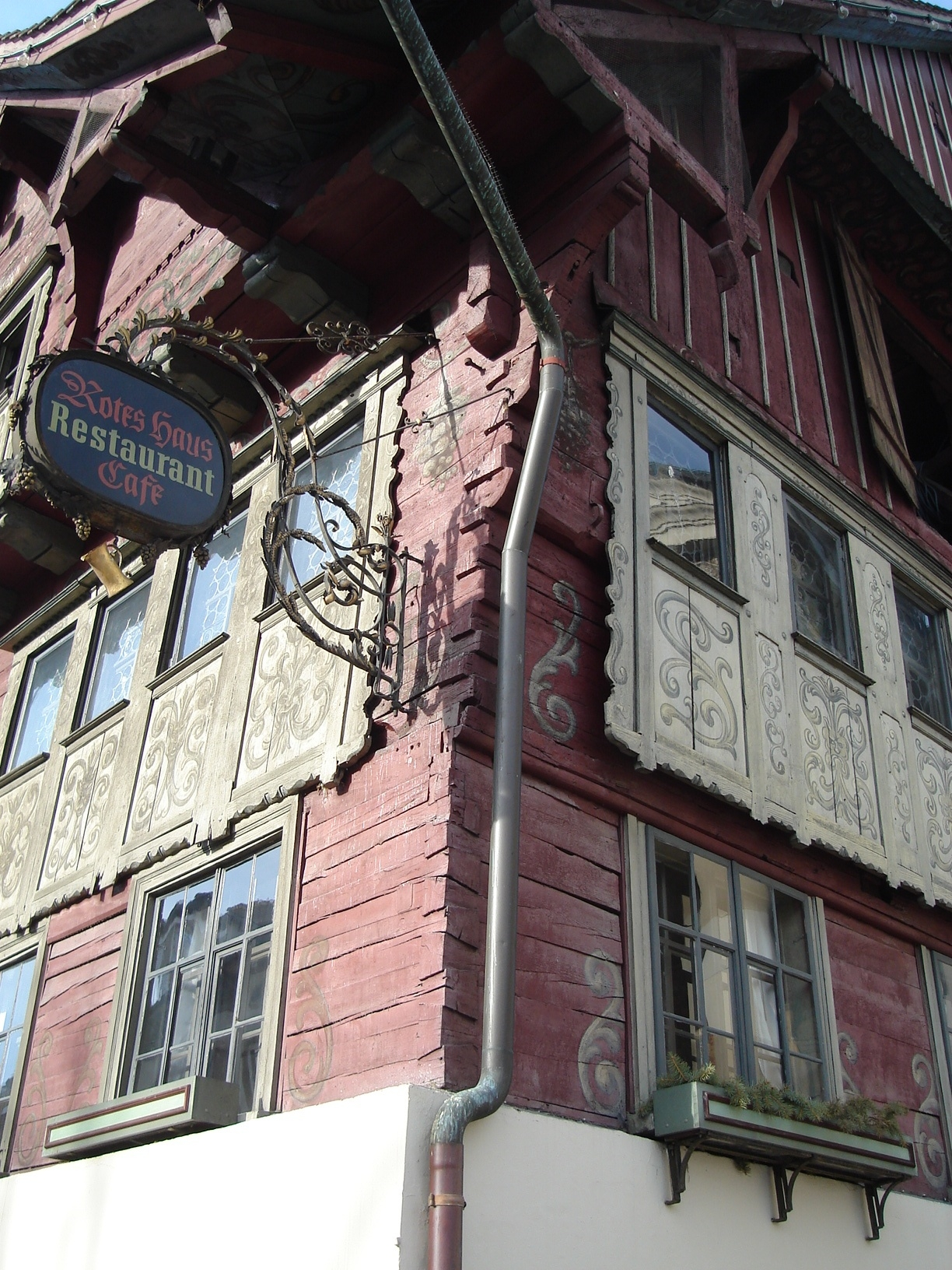 Dieses Foto zeigt eine Nahaufnahme von der Fassade des Hauses.